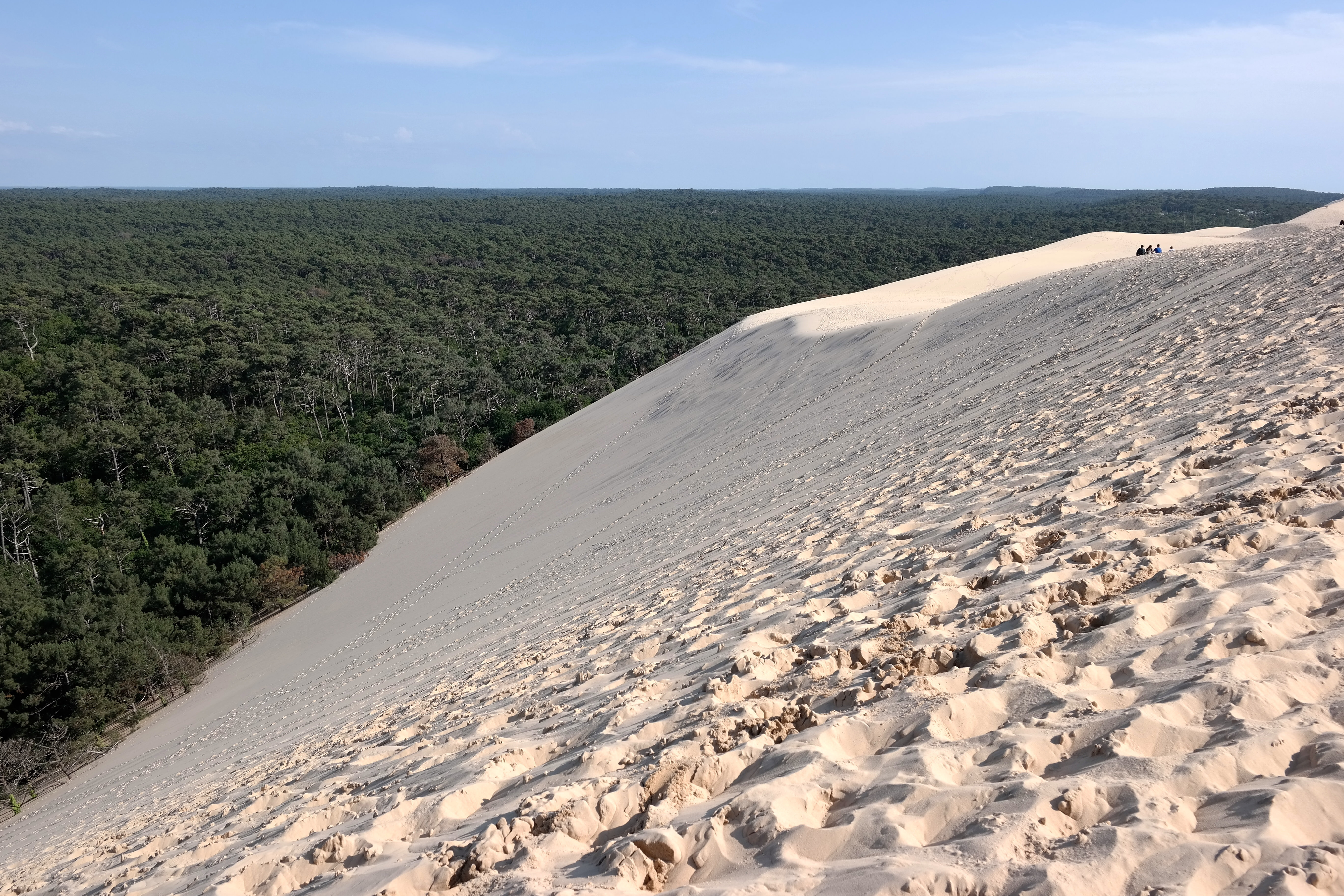 Dune du Pyla versant Est